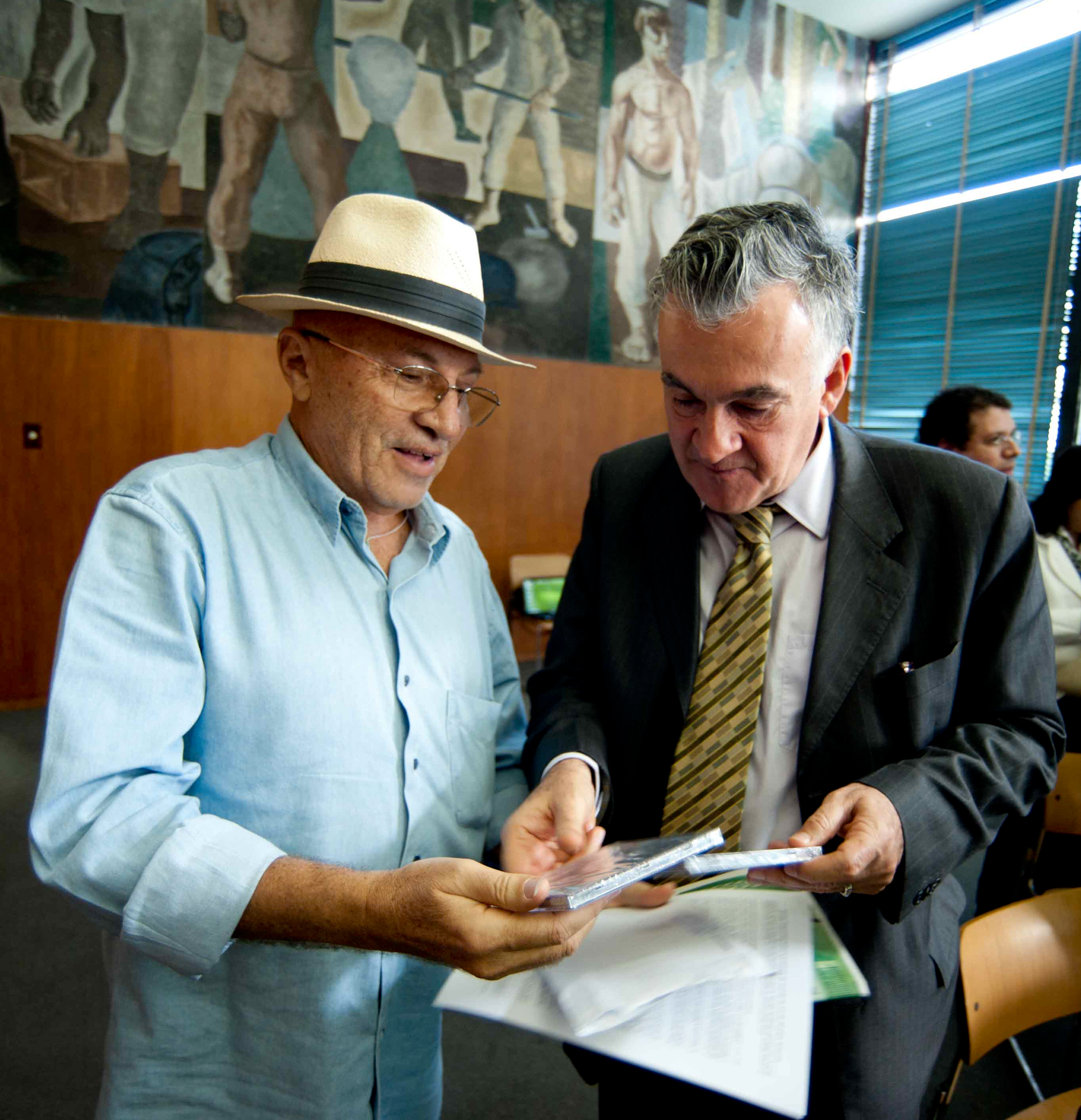 O cantor e compositor Paulo Debétio, presenteou o Ministro da Cultura, Juca Ferreira, no término da reunião com um exemplar de cada um dos seus CDs gravados recentemente, "Pelas ruas da Lapa" e "Pelas ruas do Brasil" © Pedro França/MinC